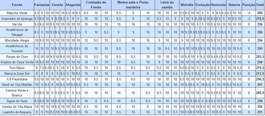 Resultados do Carnaval de São Paulo - 2005